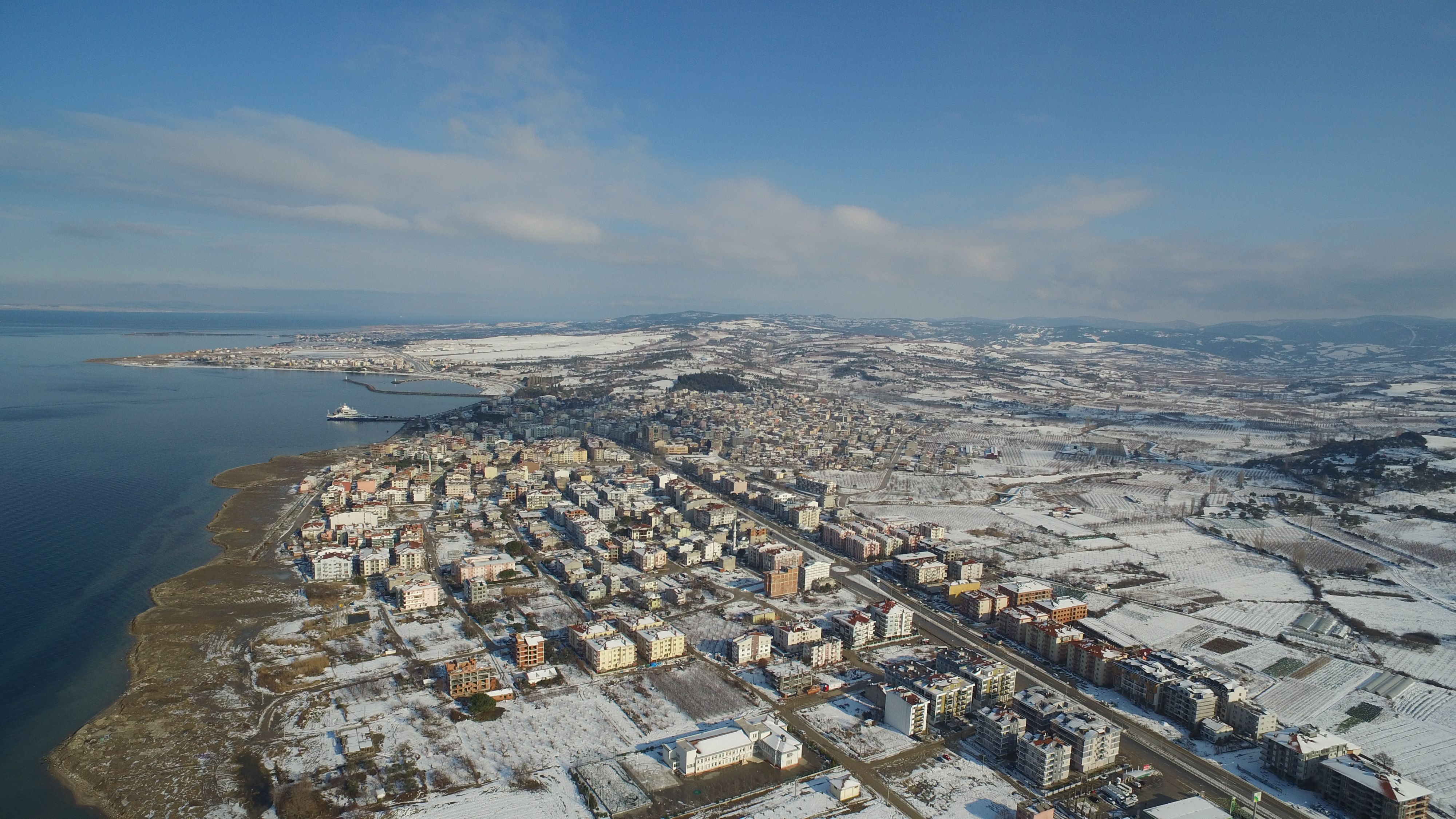 Lapseki Kar